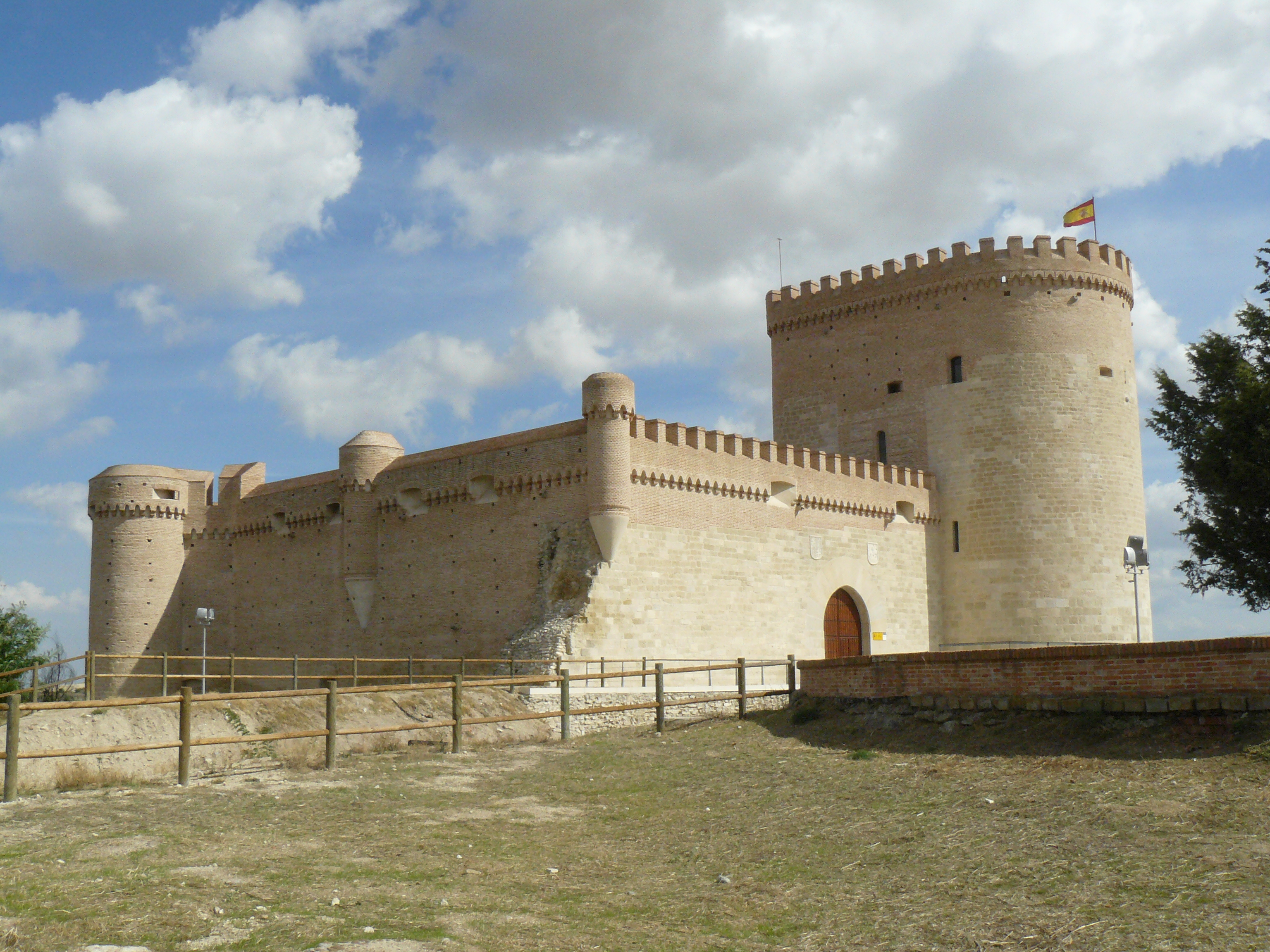 Castillo de Arévalo, Ávila.